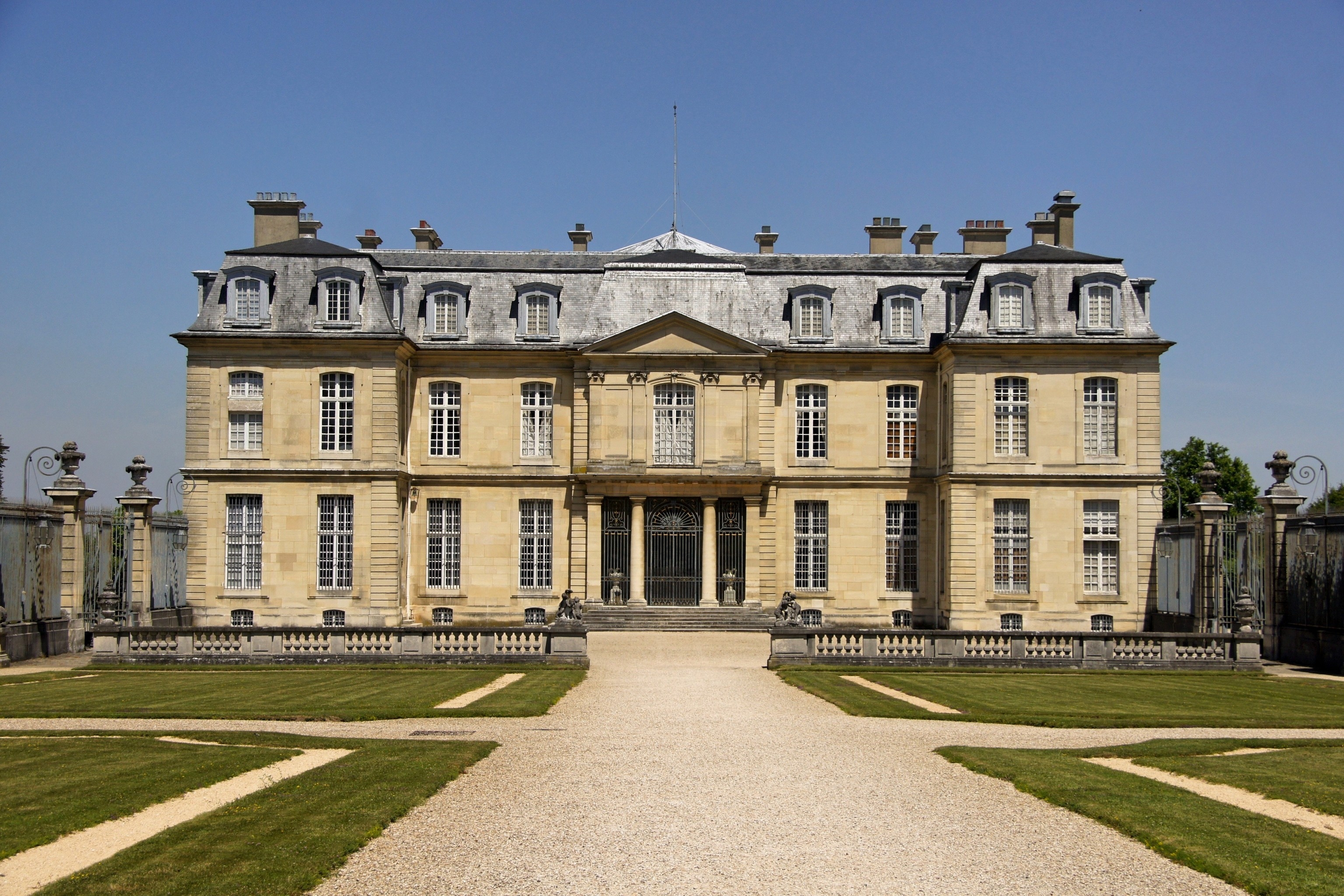 Le Château de Champs-sur-Marne